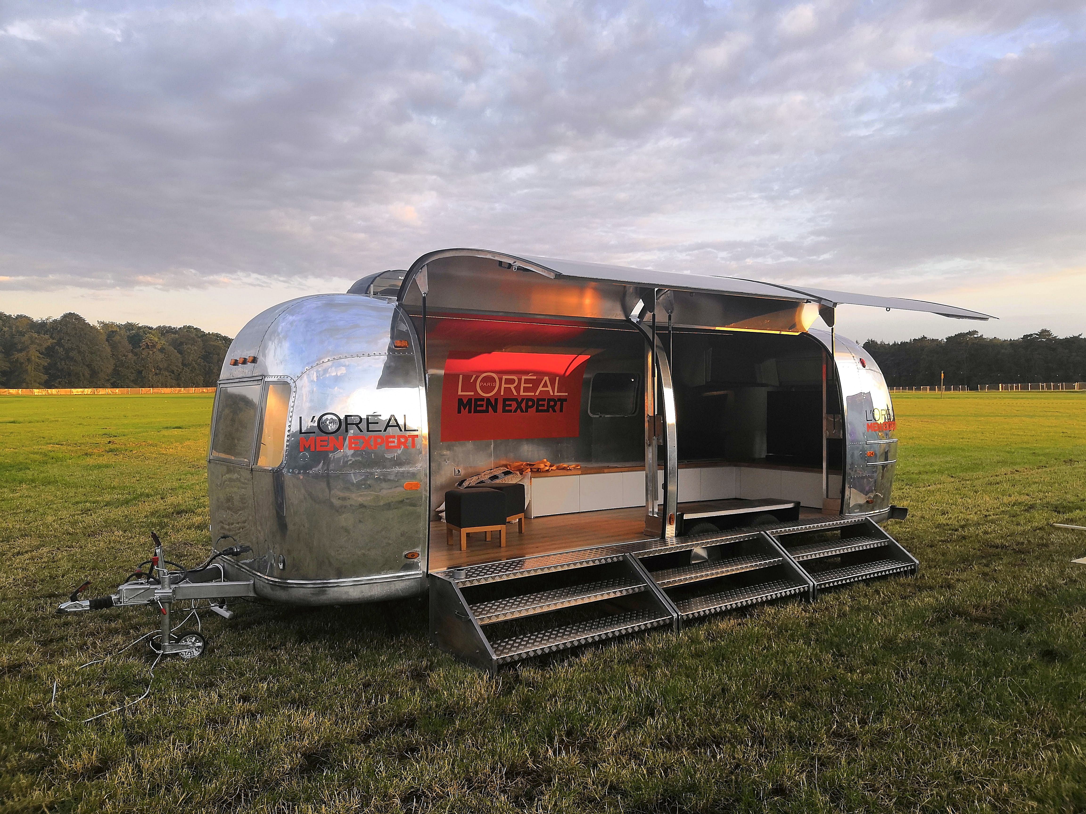 Mobile Bühne Hurrican Festival Deutschland